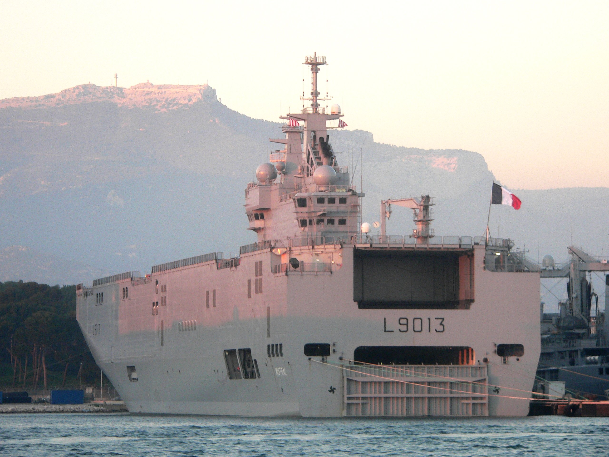 Bâtiment de projection et de commandement Mistral au coucher du soleil dans le port militaire de Toulon, France, en 2006